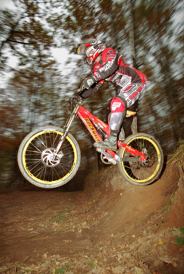 MTB downhill race, Krasnogorsk, Moscow region, Russia, 2002